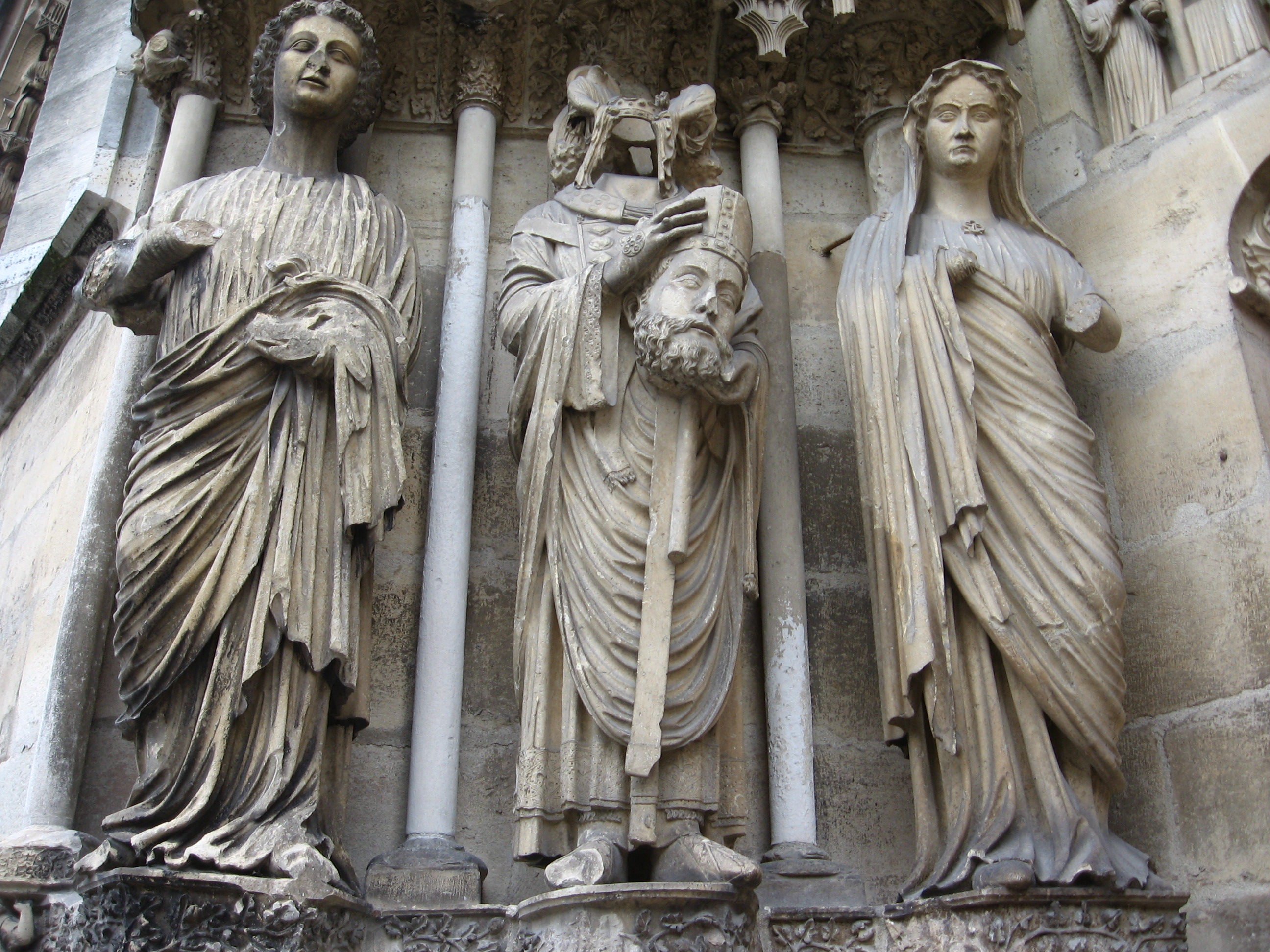 Statue de Saint Nicaise, détail du portail des Saints, transept nord de la Cathédrale Notre-Dame de Reims, France.